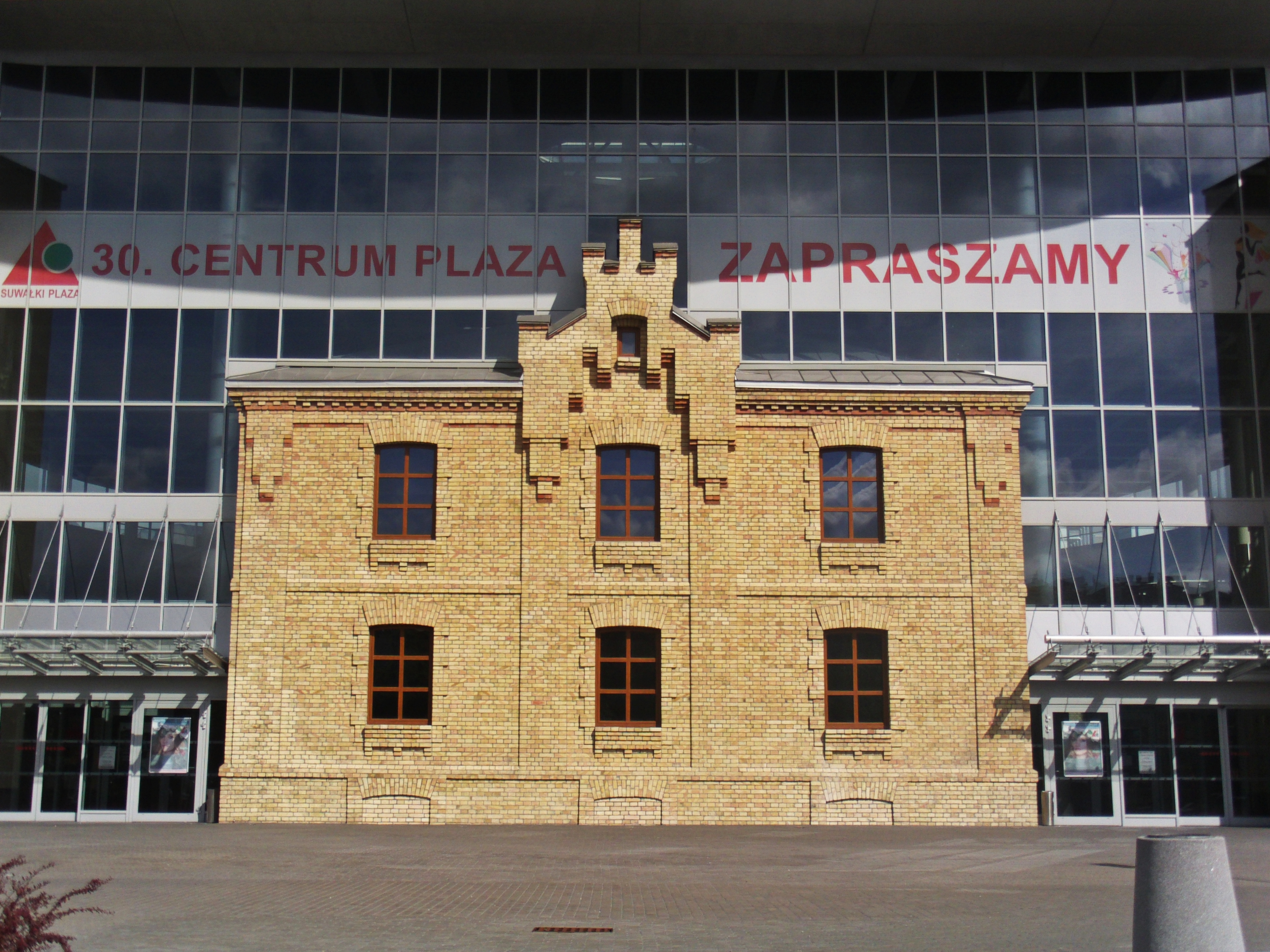 Suwałki, ul. Dwernickiego 17 - zespół dawnych budynków więziennych, wkomponowany w galerię handlową Plaza (zabytek nr A-181 z 4.02.2008)